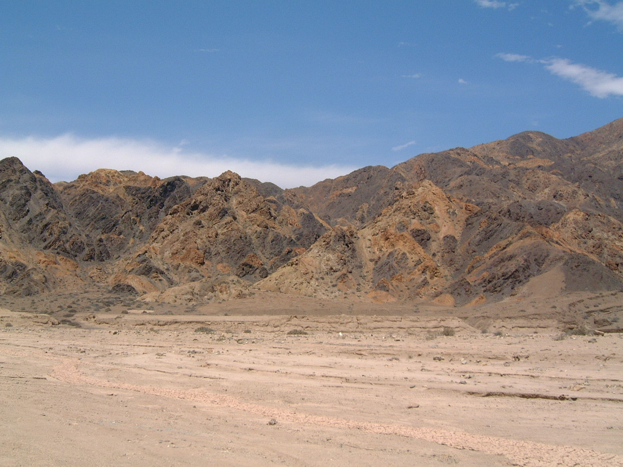 Parque Nacional Pan de Azúcar, Chile 8.11.2005 By Herman Luyken